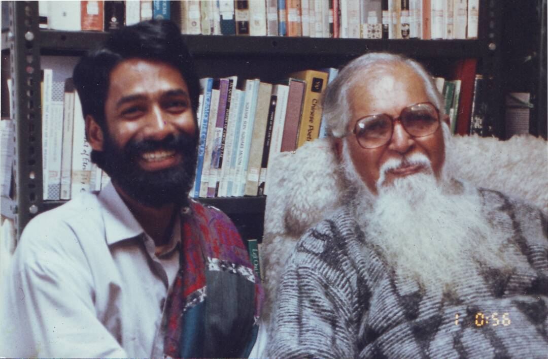 ഷൌക്കത്ത് സഹജോത്സു ഗുരുനിത്യചൈതന്യയതിയോടൊപ്പം